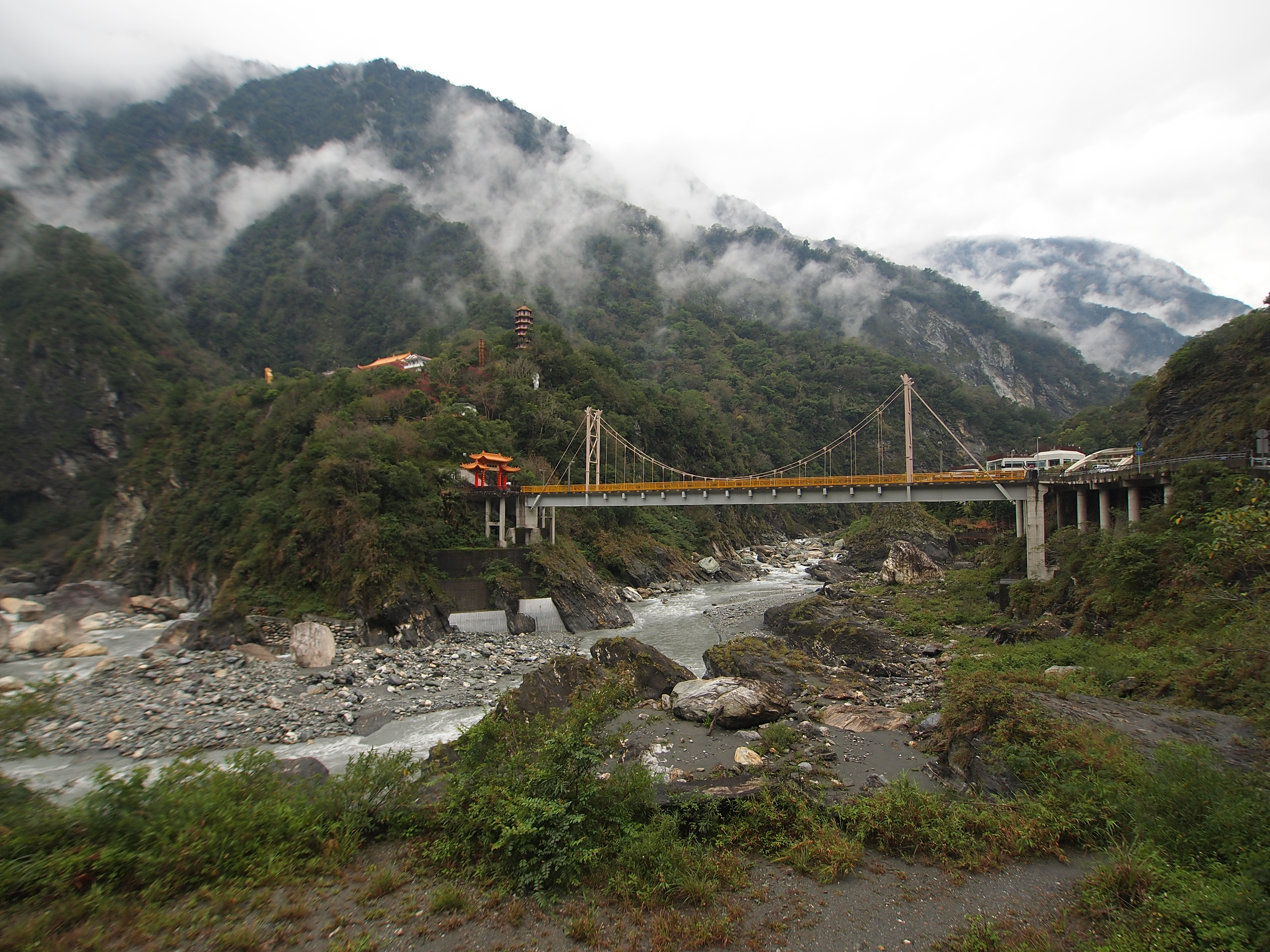 天祥普度桥 - Pudu Bridge - 2012.02